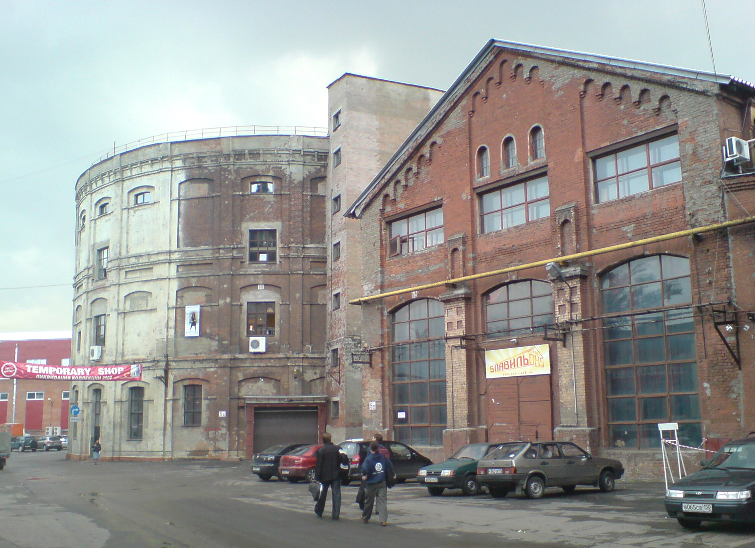 Московский газовый завод. Вид на газгольдер и производственный корпус.